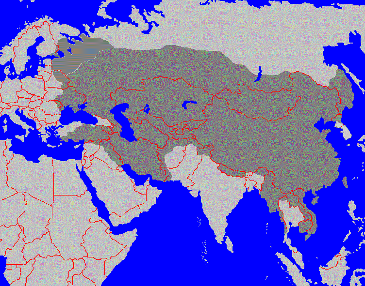 Dastellungskarte des Mongolenreiches kurz vor dessen Auflösung (1295), selbst erstellt am 08. Aug. 2004; Public Domain Diese Darstellungskarte zeigt das mongolische Gesamtreich Khubilai Khans zum Zeitpunkt seines Todes (1295).